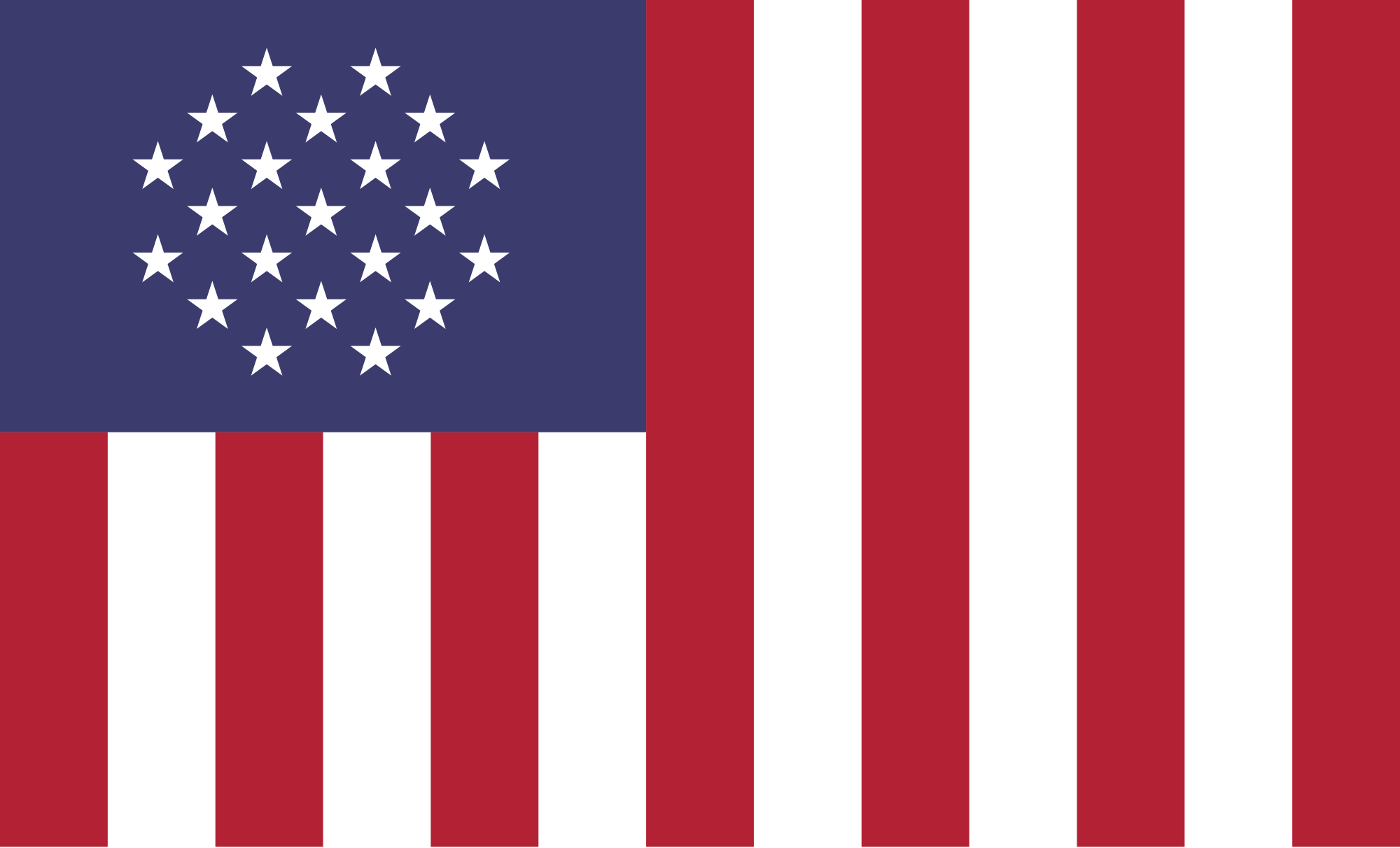 Bandera de Jericho